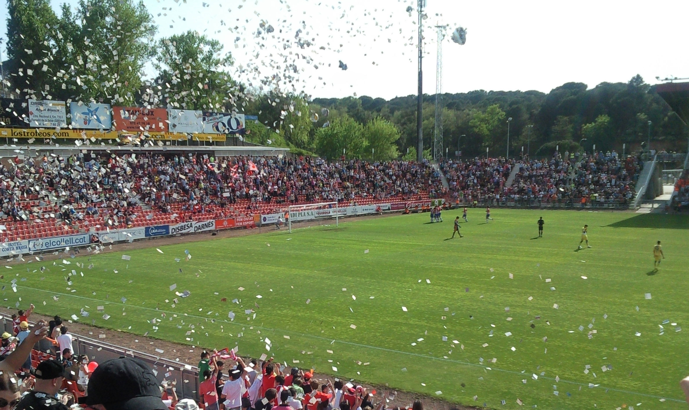 Temporada 2010/11